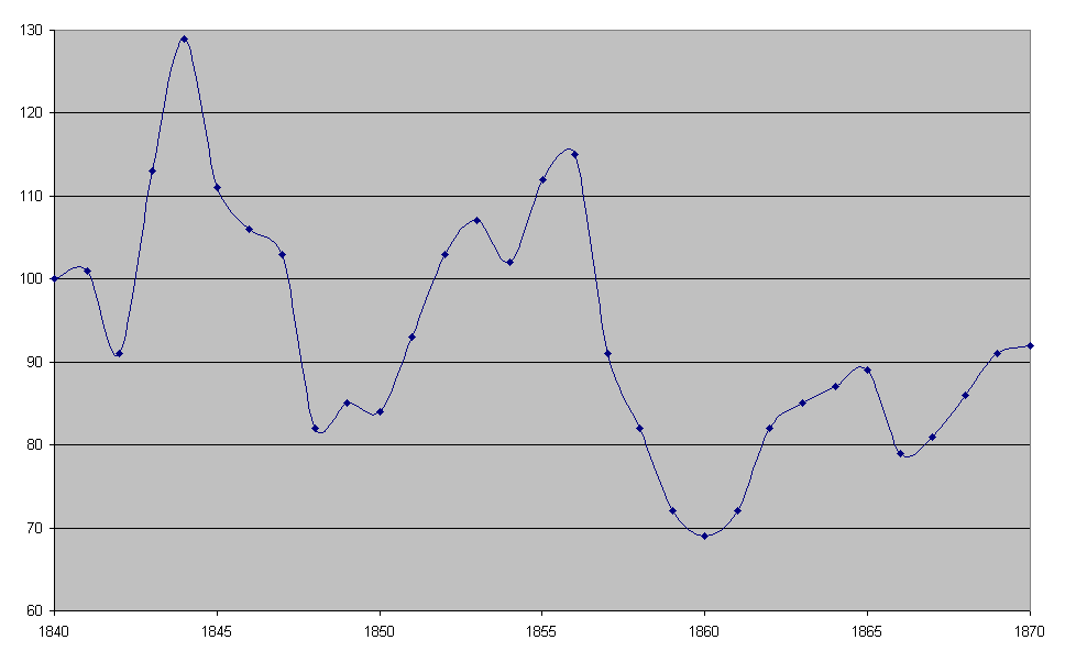 Aktienindex Deutsche Börsen 1840-1870 (1840=100) (Zahlen nach Sozialgeschichtliches Arbeitsbuch, Bd1, S.100)